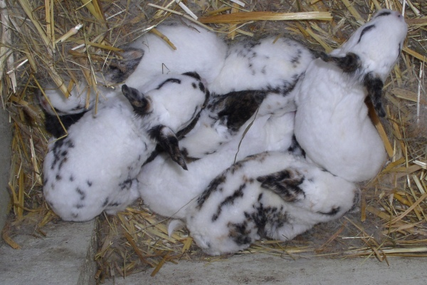 Nid de petits lapins.